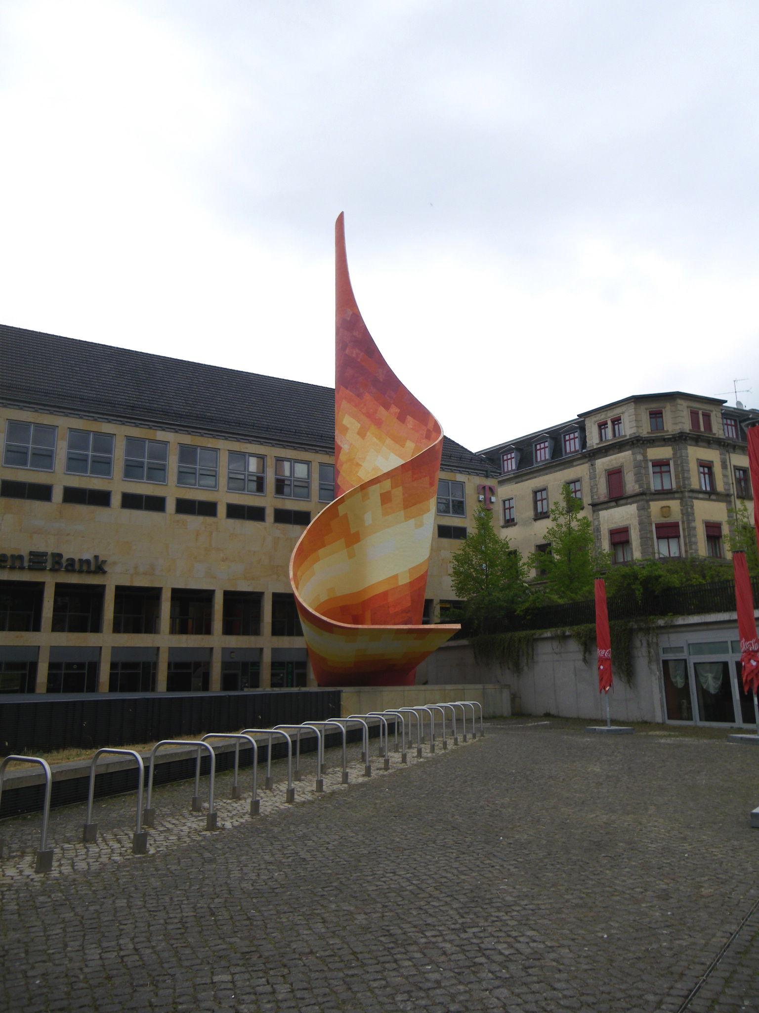 Sigbert Fliegel, Flamme der Revolution - Fahnenmonument, 1967/71, Betonschale, Umgestaltung und farbige Neufassung (Steffen O. Rumpf, 2004) Hansering